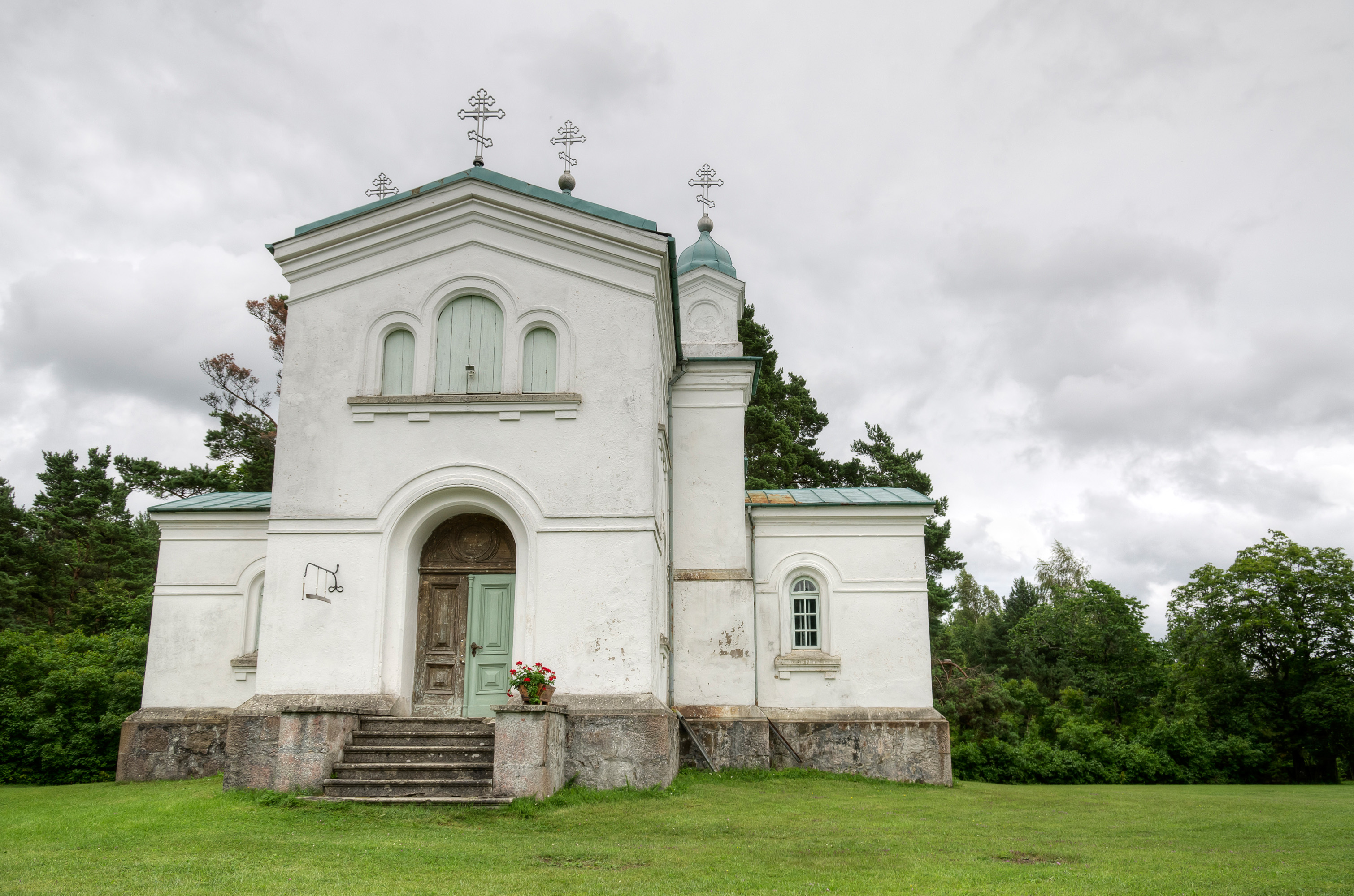 Reomäe Apostel Andrease kirik Saaremaal. Vaade läänest.